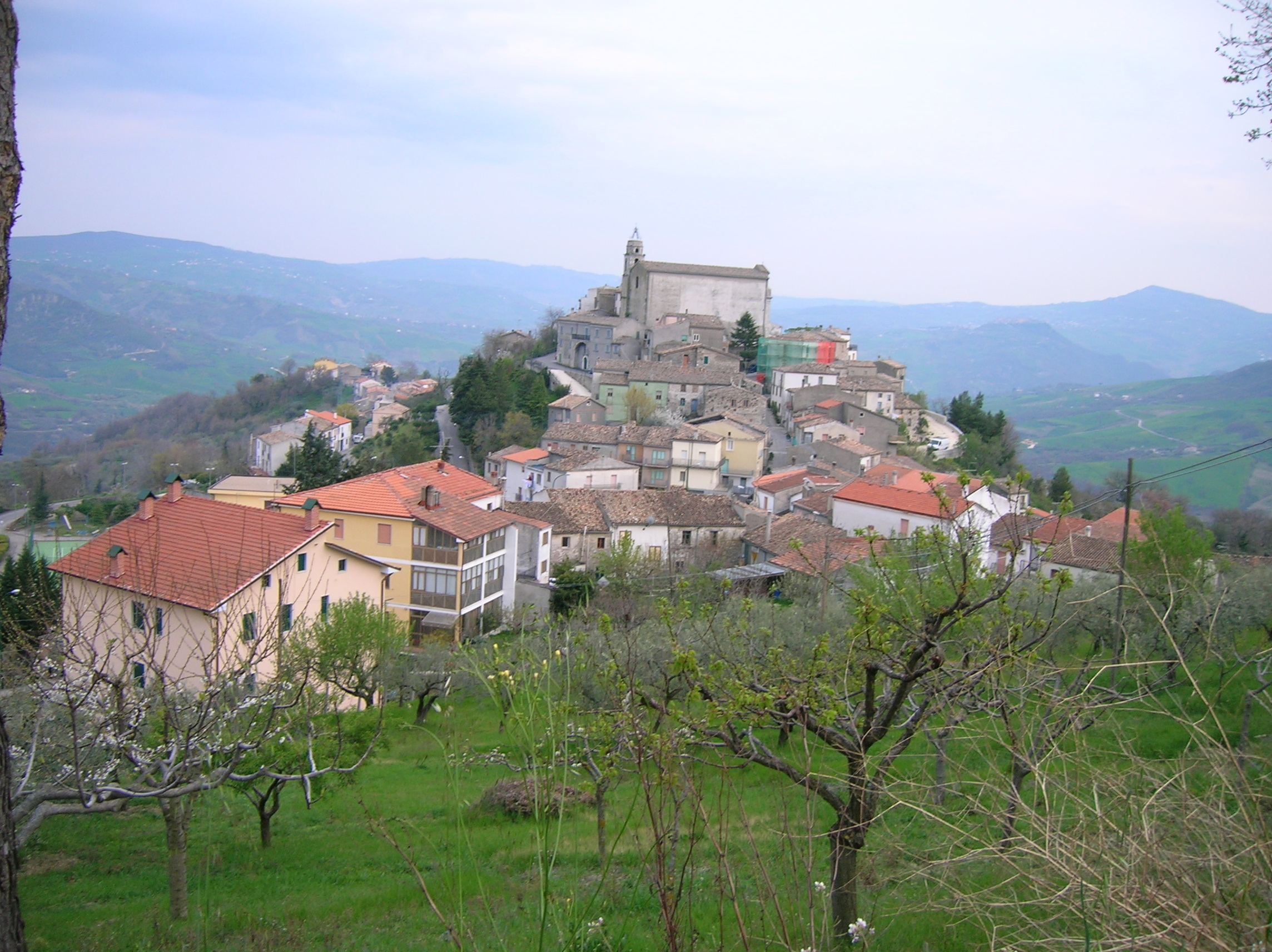 Panorama di San Giovanni Lipioni